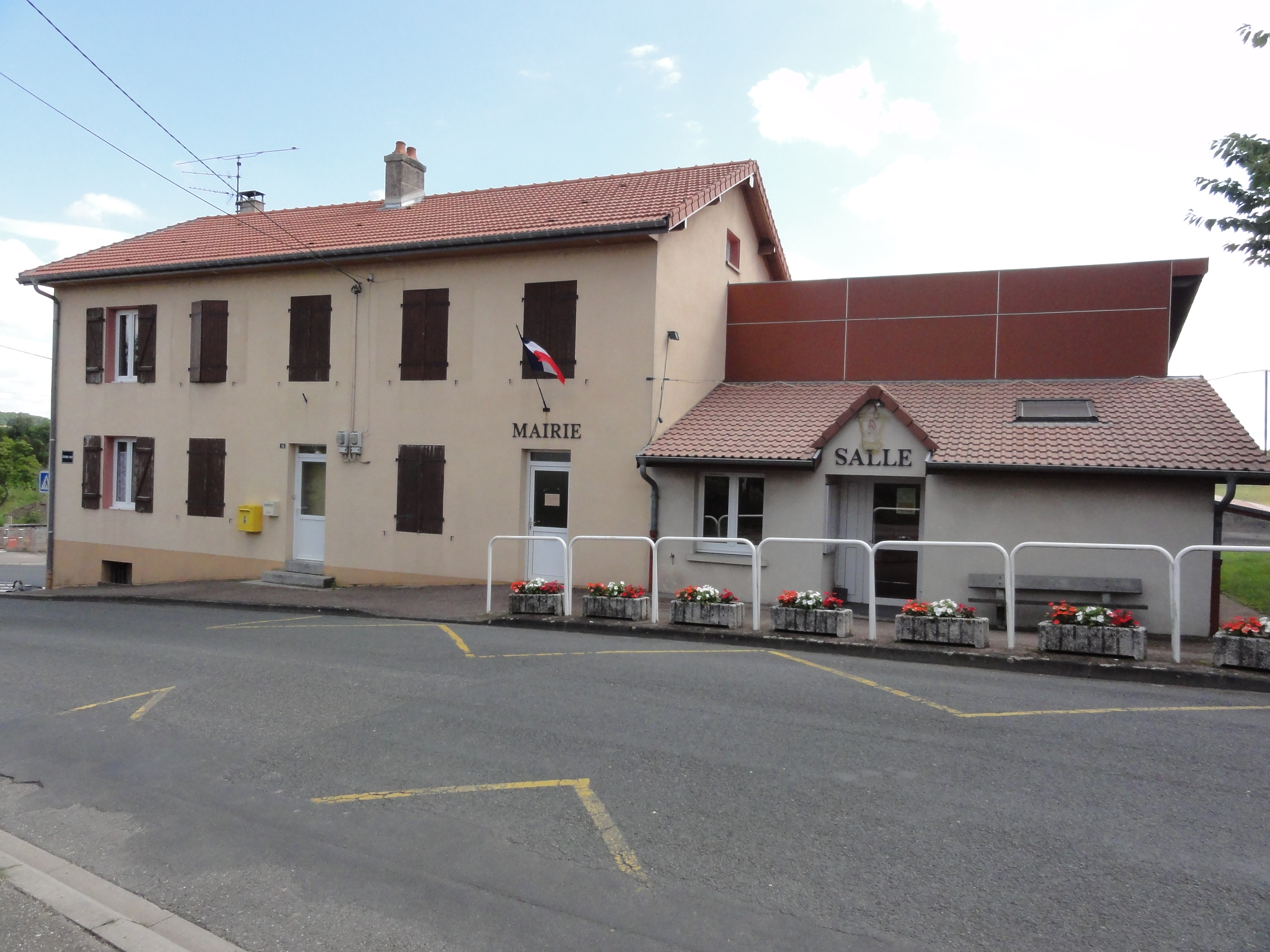 Crion (M-et-M) mairie et salle communale